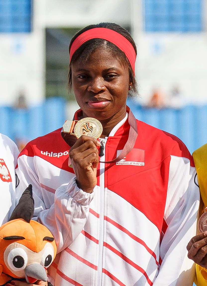 Bronze para Rosângela Cristina Oliveira Santos nos 200m em Mungyeong pelos 6º Jogos Mundiais Militares. Foto: Sgt Johnson Barros